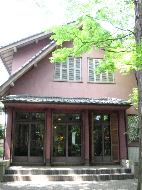 旧大田黒元雄邸（東京都杉並区の大田黒公園で撮影。現在は大田黒記念館）